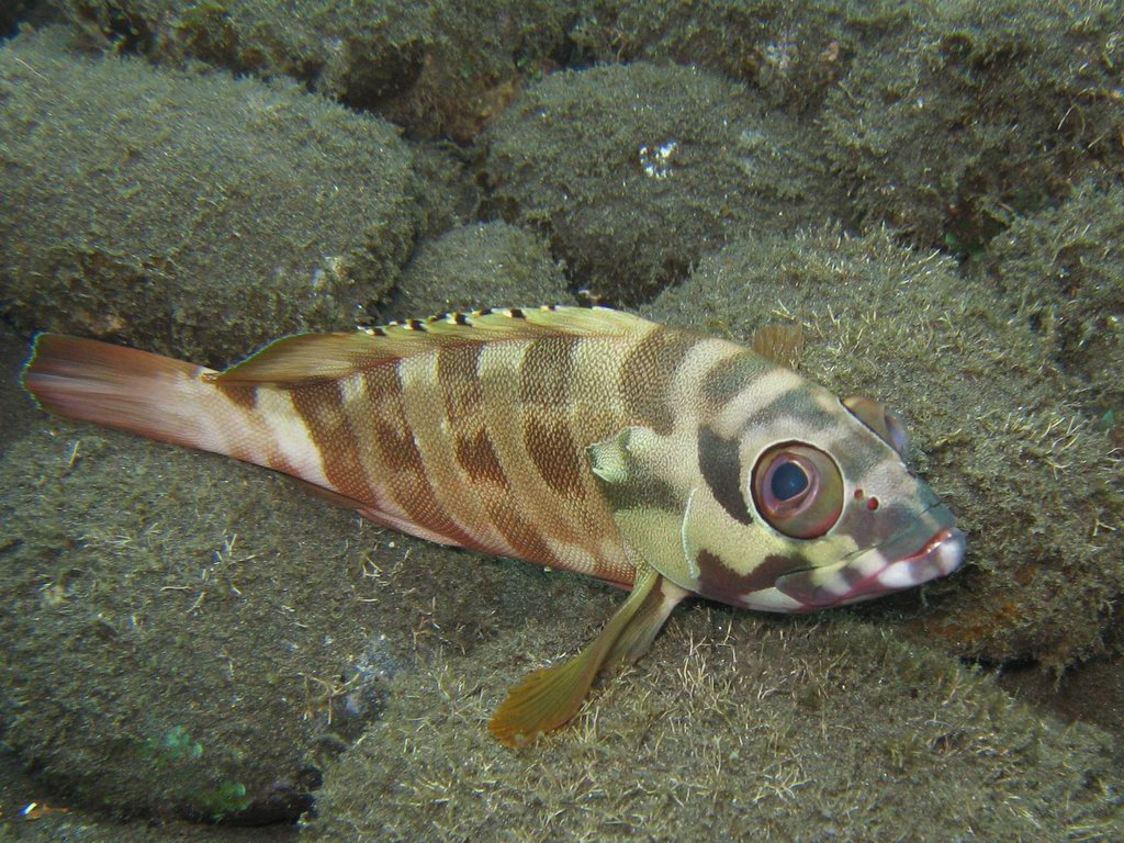 Epinephelus fasciatus cruentatus